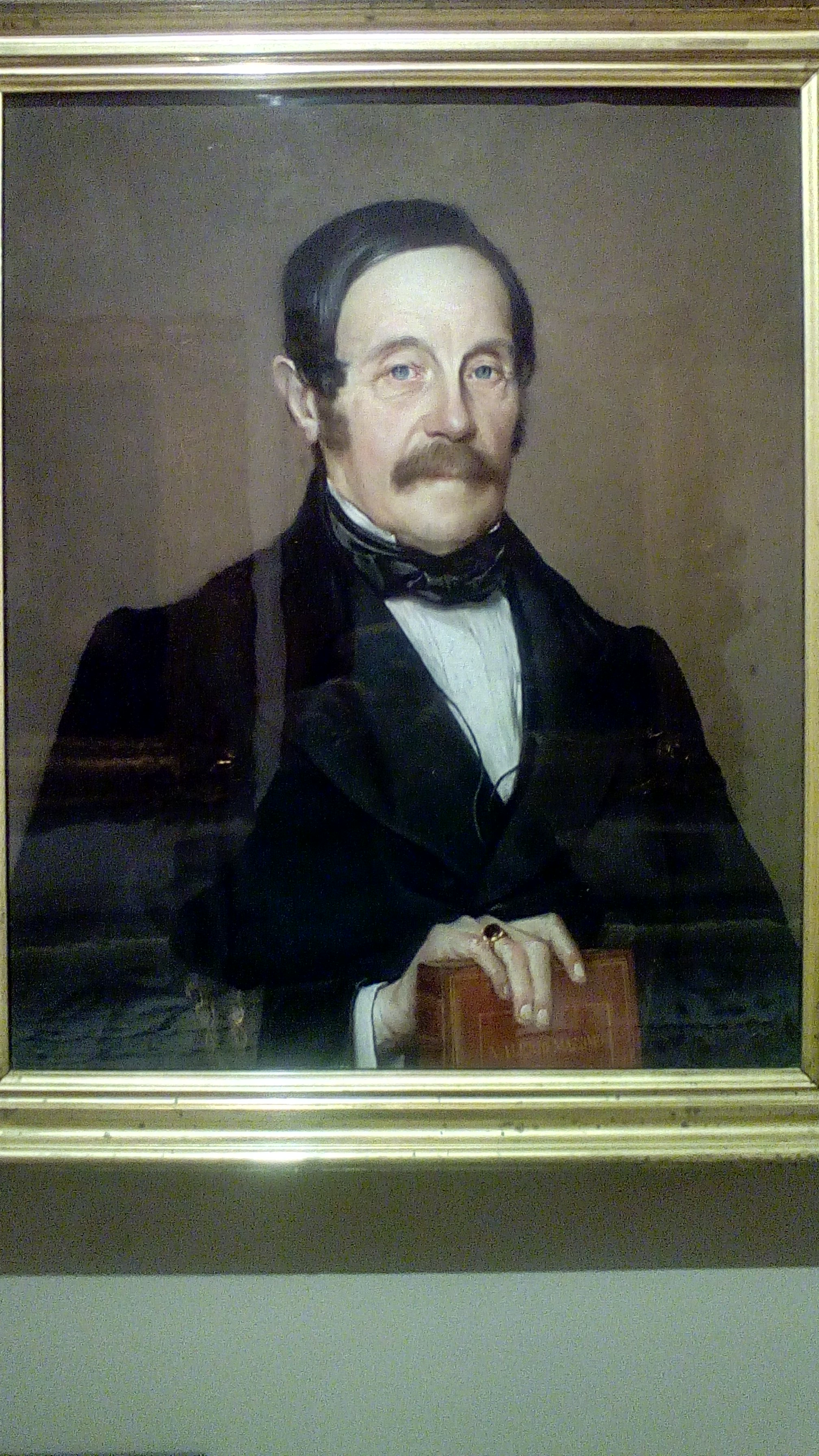 Post 1875 Silvio Della Valentina. Palazzo Zuckermann Inv 740